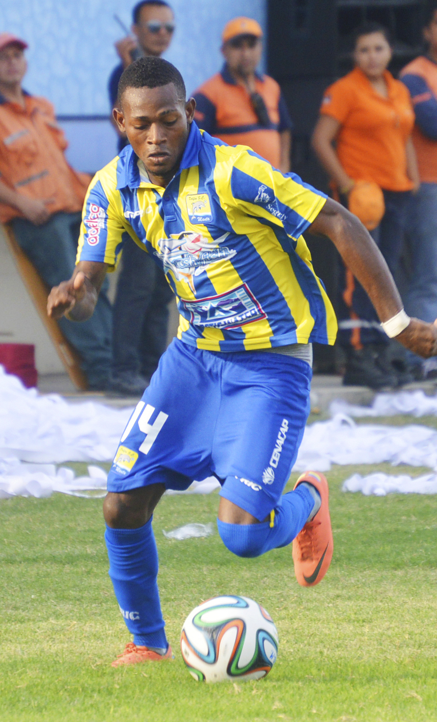 Ever Quiñonez jugando en el Delfín SC de 2014